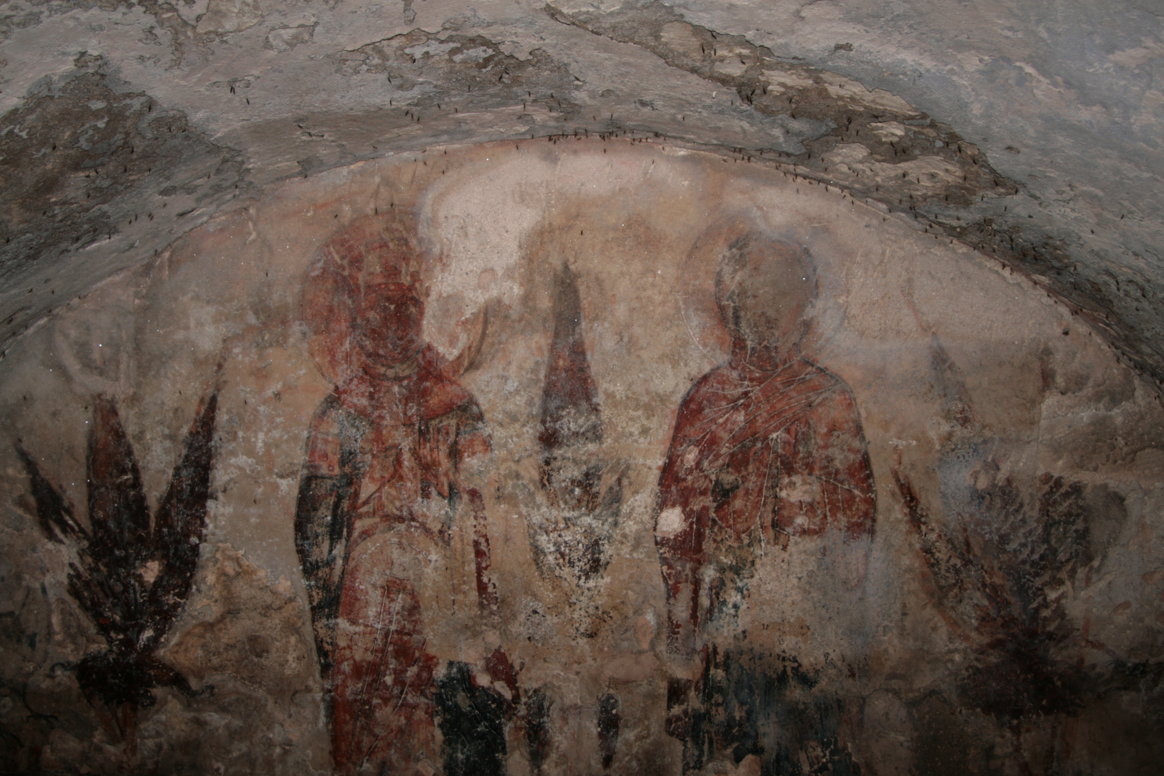 Фреска в нише северной стены.